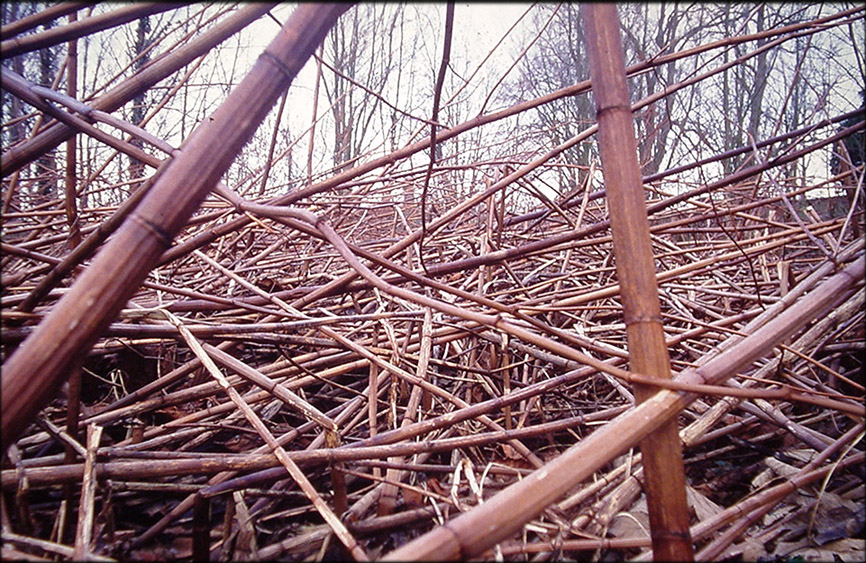 tapis de tiges de renouée du Japon, dans le site de la Poudrerie d'Esquerdes (site à l'abandon depuis 40 ans environ, pollué par les nitrates), Pas de Calais, Nord de la France.